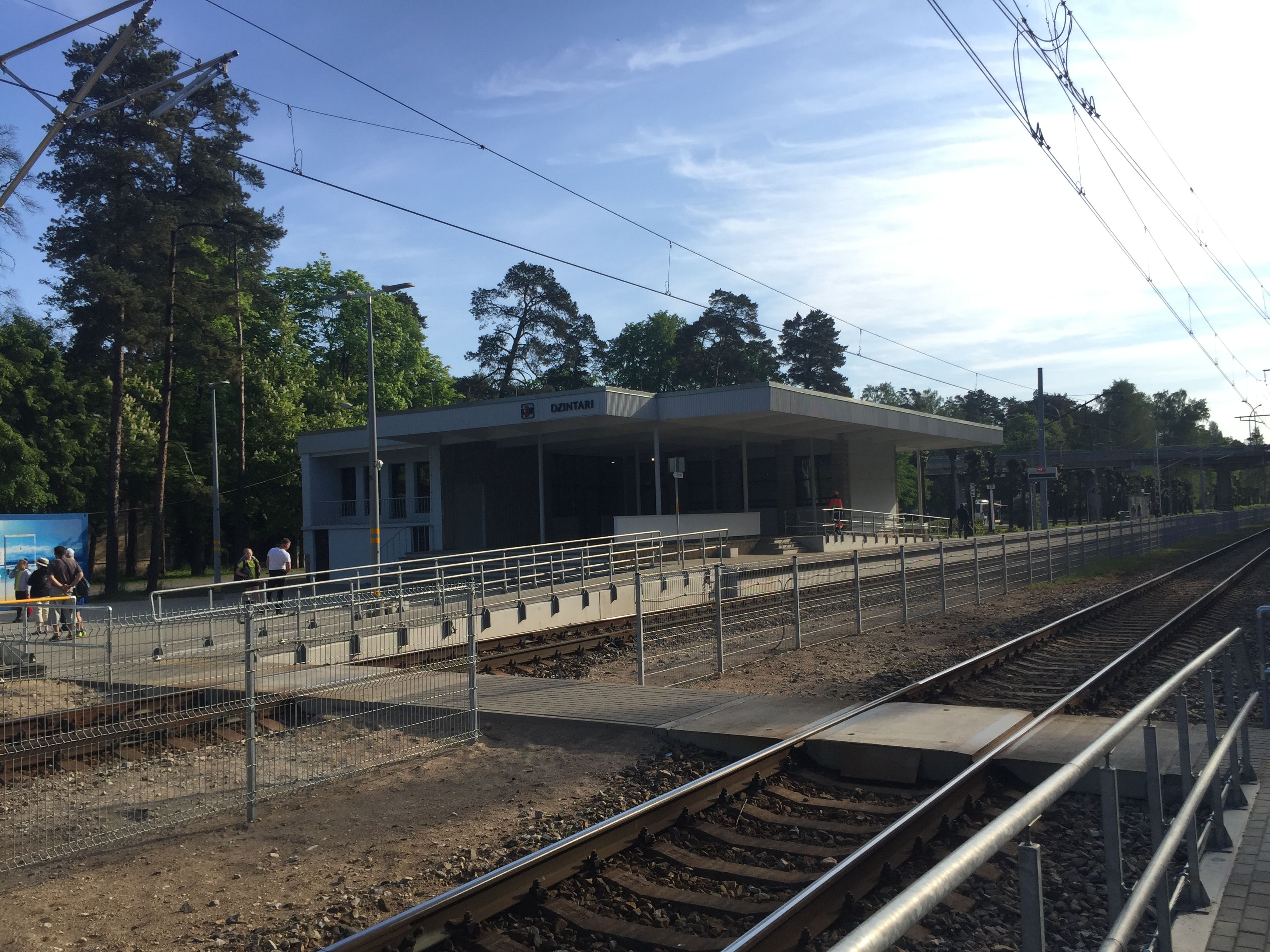 Dzintaru stacijas ēka 2016. gadā